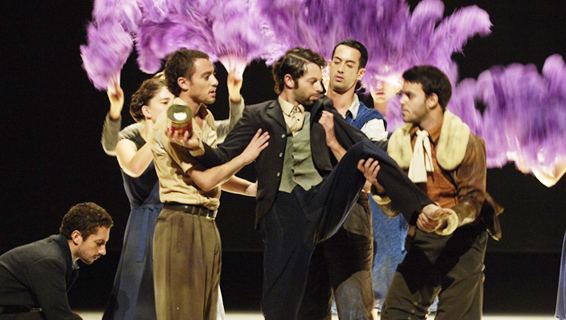 Barak Marshall Rooster at Suzanne Dellal Centre 2010